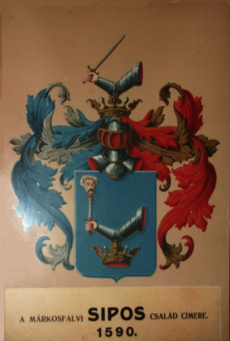 A kézdimárkosfalvi Sipos család címere, festve, készítette Sipos Béla Kolozsvárt 1930-ban